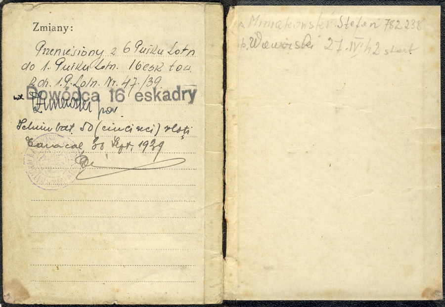 Legitymacja osobista Mieczysława Halickiego 4